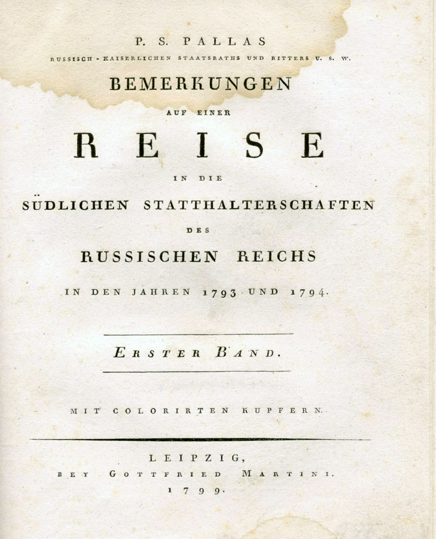 Title page of the book Bemerkungen auf einer Reise in die südlichen Statthalterschaften des Russischen Reichs in den Jahren 1793 und 1794. Erster Band. Mit colorirten Kupfern. Leipzig, bey Gottfried Martini. 1799.